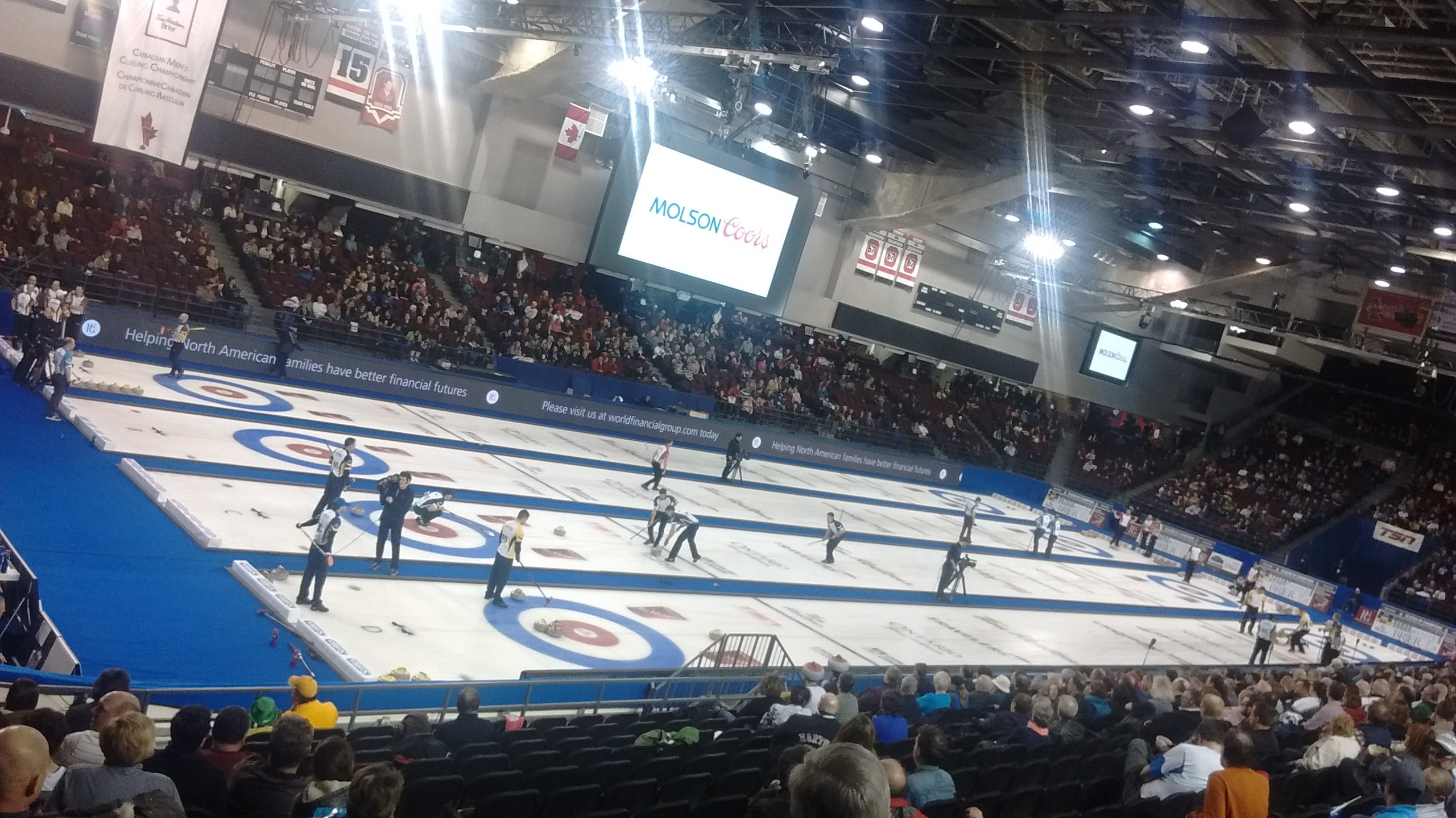 2016 Tim Hortons Brier Draw 13